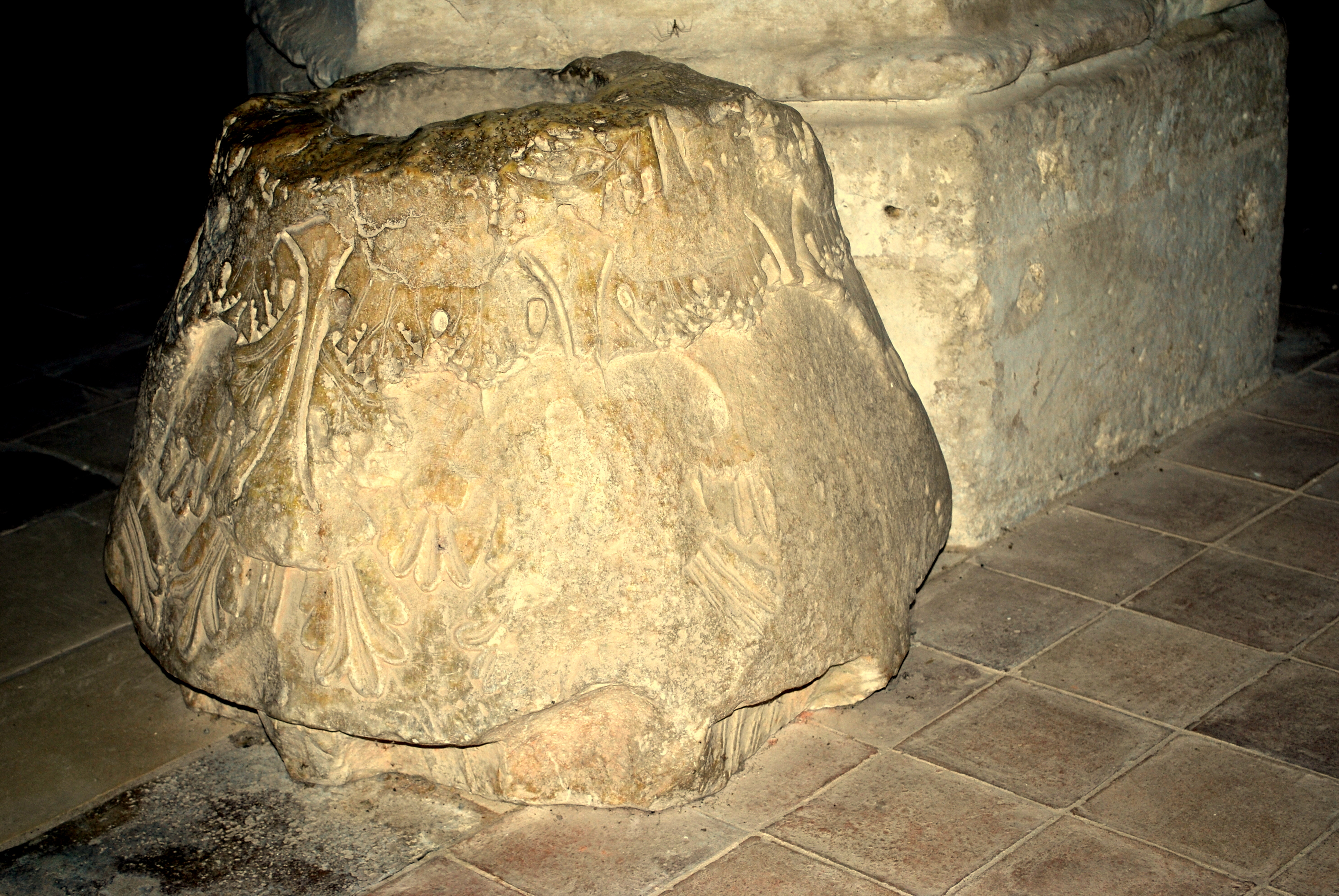 Corme-Royal église St Nazaire